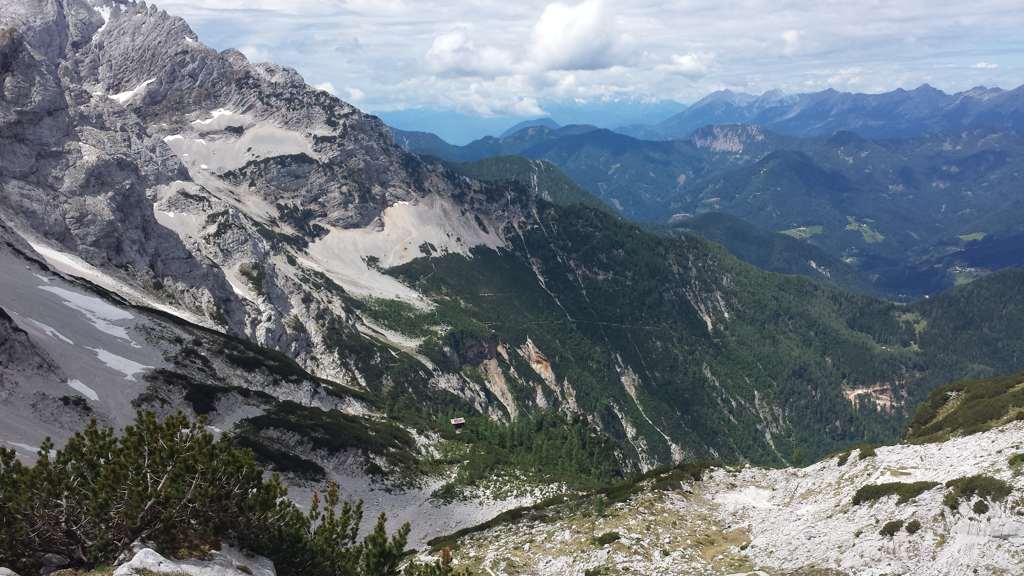 Ledine, Kranjska koča na Ledinah, 1680 m. n. m. Jezersko, Slovenija Pogled iz Savinjskega sedla proti koči na Ledinah.